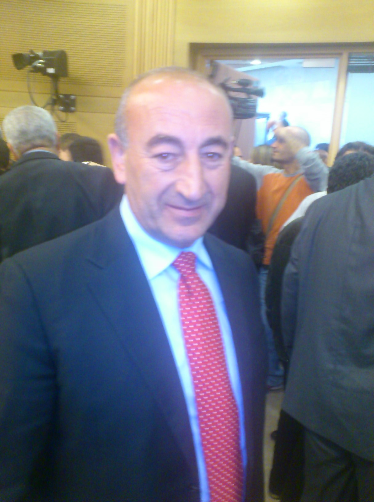 אחמד דבאח